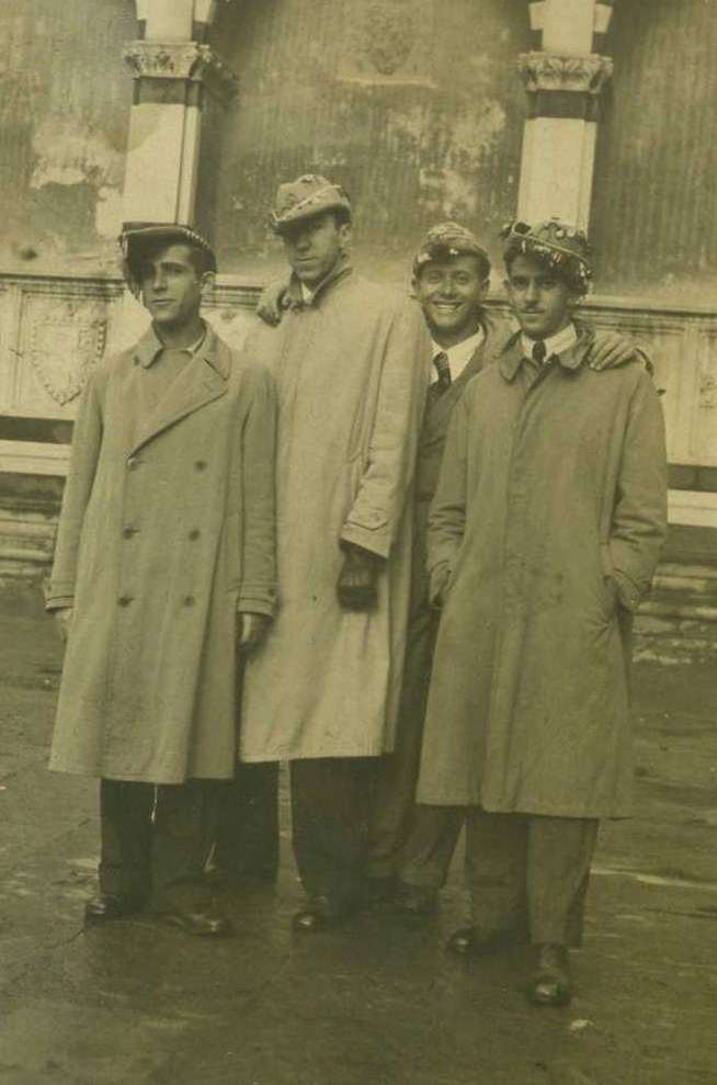 Quatre étudiants de la Goliardia photographiés en 1933.